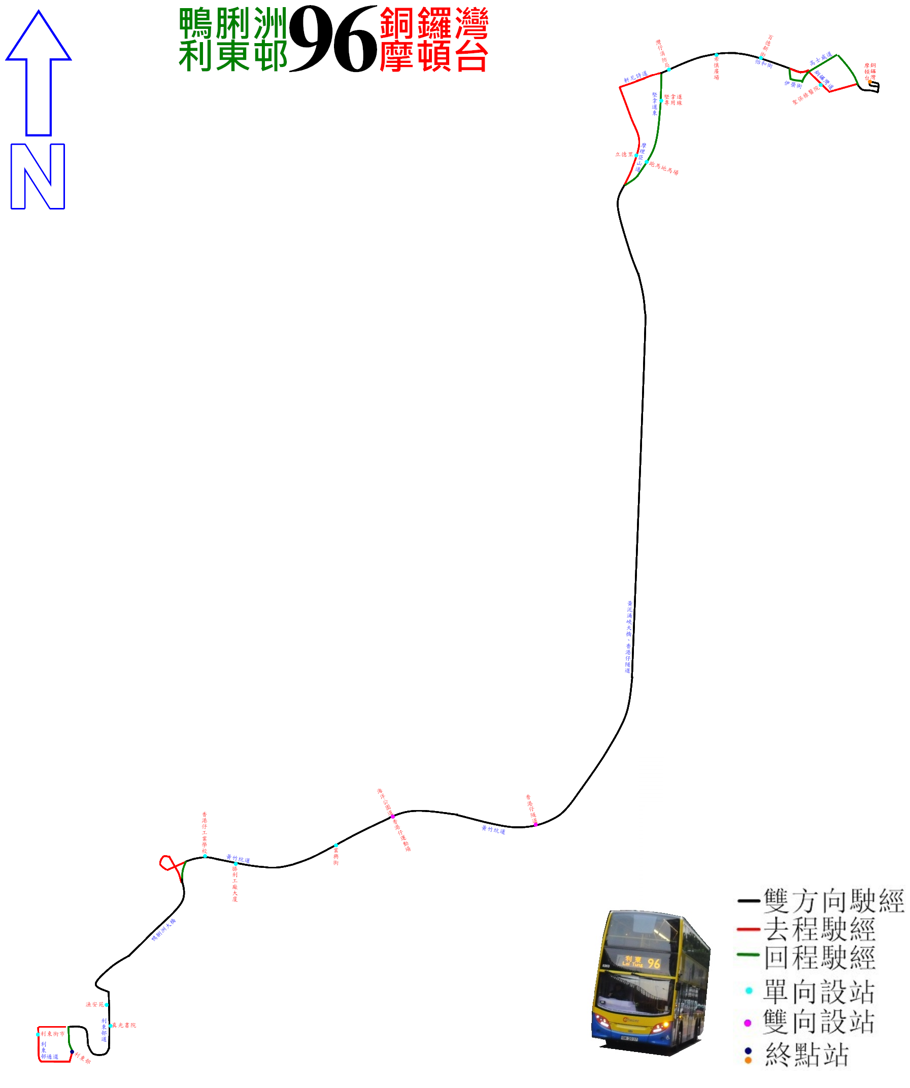 中文（香港）: 城巴96線的走線圖